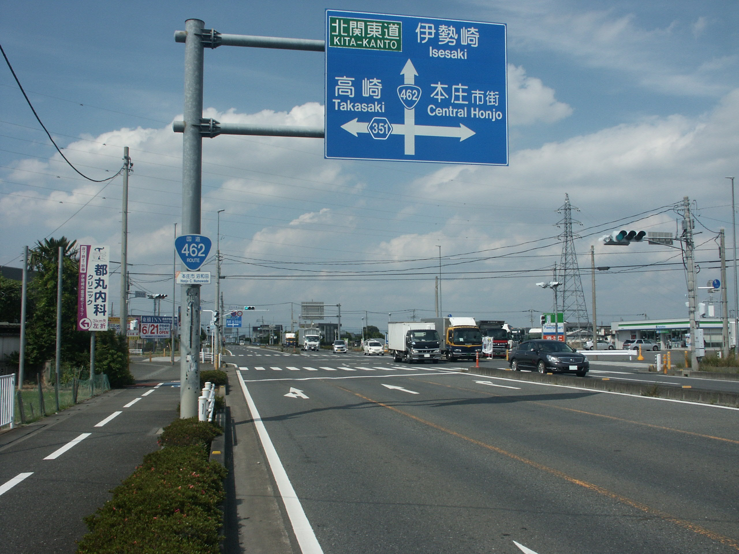 国道４６２号線埼玉県本庄市沼和田付近（伊勢崎方面を撮影）